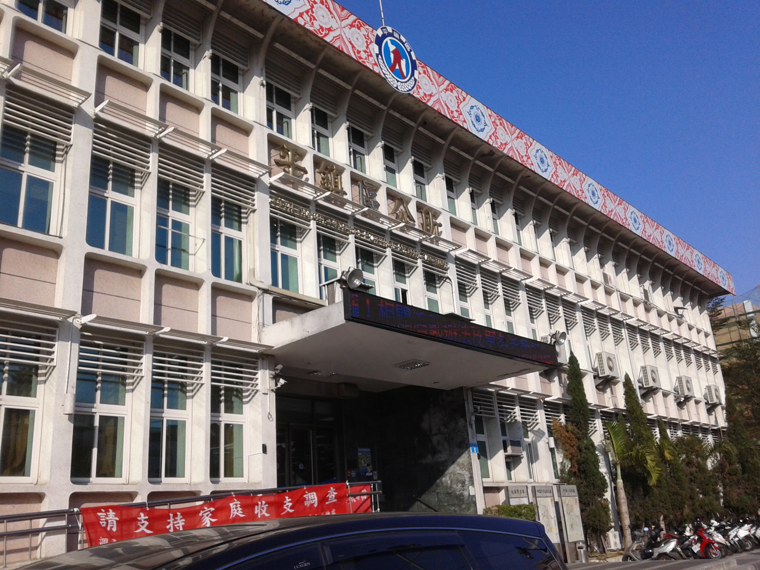 中文（台灣）: 桃園市平鎮區公所。